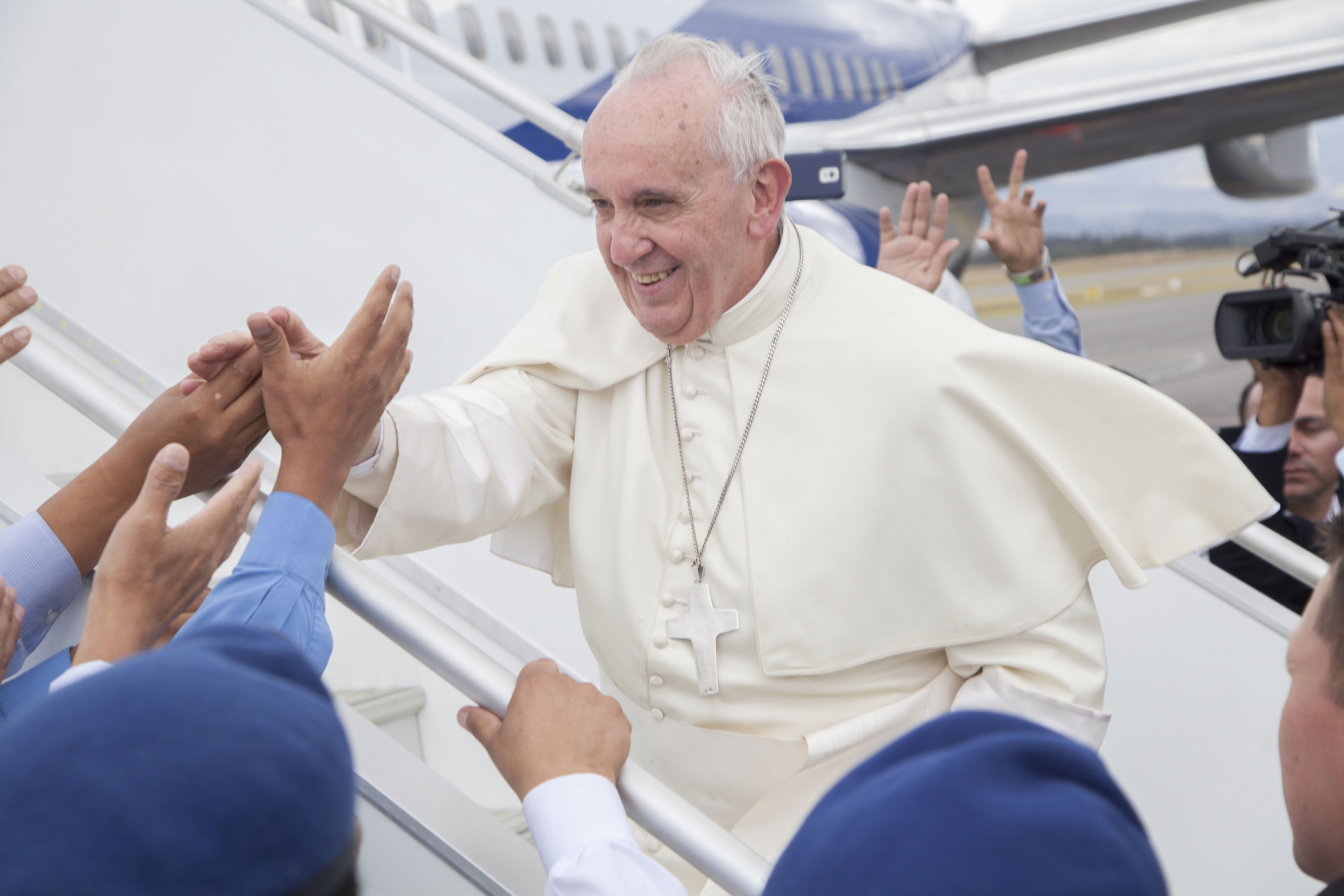 Quito, Ecuador 8 de julio de 2015. El presidente de3 la República, Rafael Correa junto a varias autoridades, despiden al Papa Francisco en el Aeropuerto Mariscal Sucre de Quito. Seguido de este acto, el Canciller Ricardo Patiño y autoridades eclesiásticas encabezadas por el Monseñor Fausto Trávez, Arzobispo de Quito ofrecen una rueda de prensa. Carlos Pozo Albán / Cancillería del Ecuador